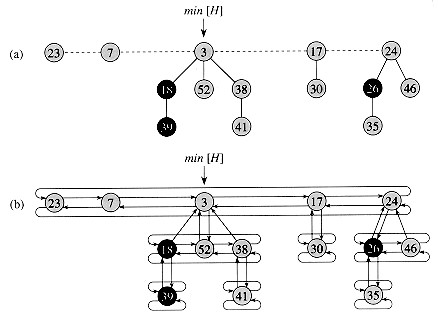 한국어 (조선): 피보나치 수열1